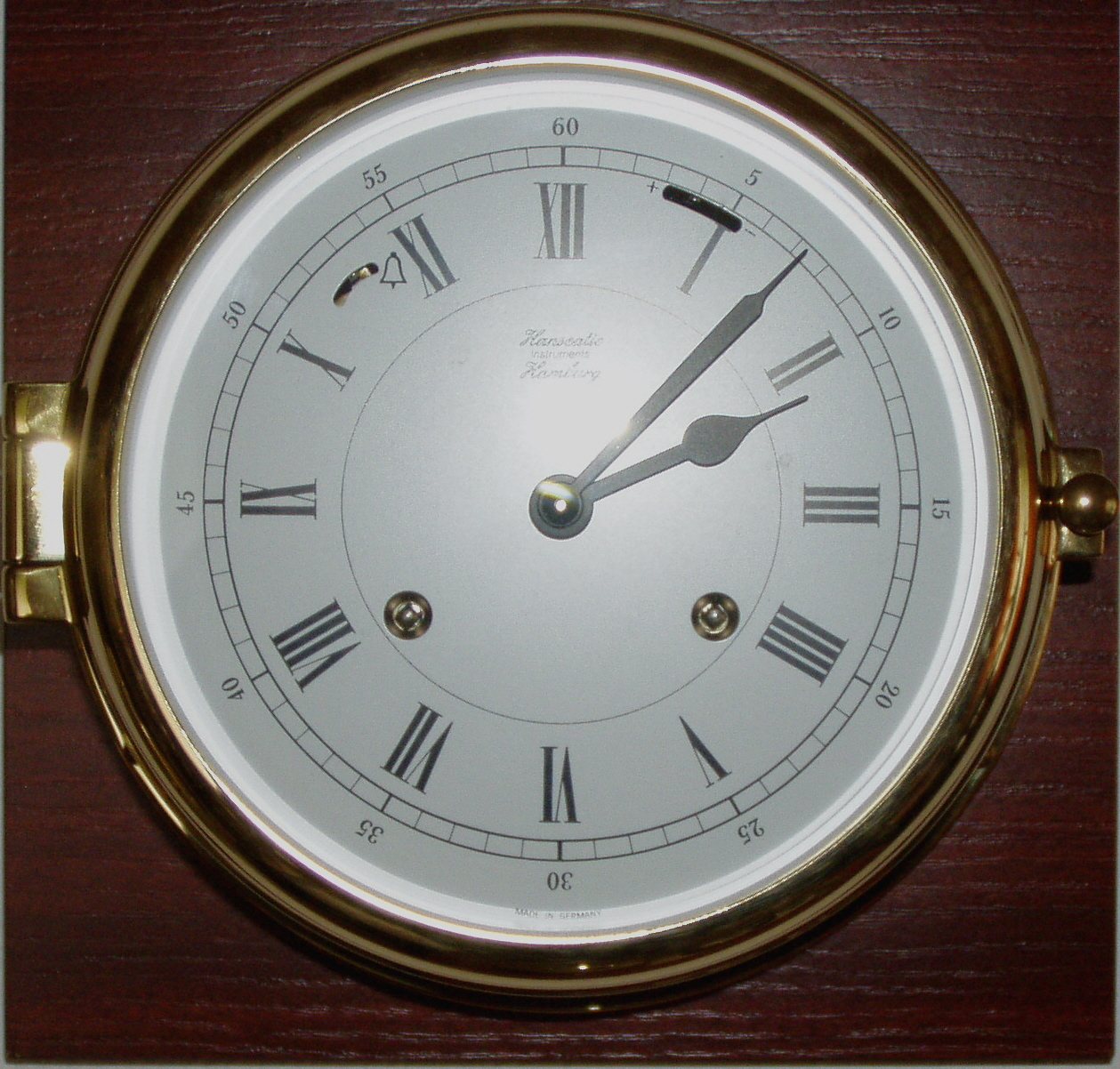 Mechanische Schiffsuhr (Glasenuhr) 12 Tage Laufzeit